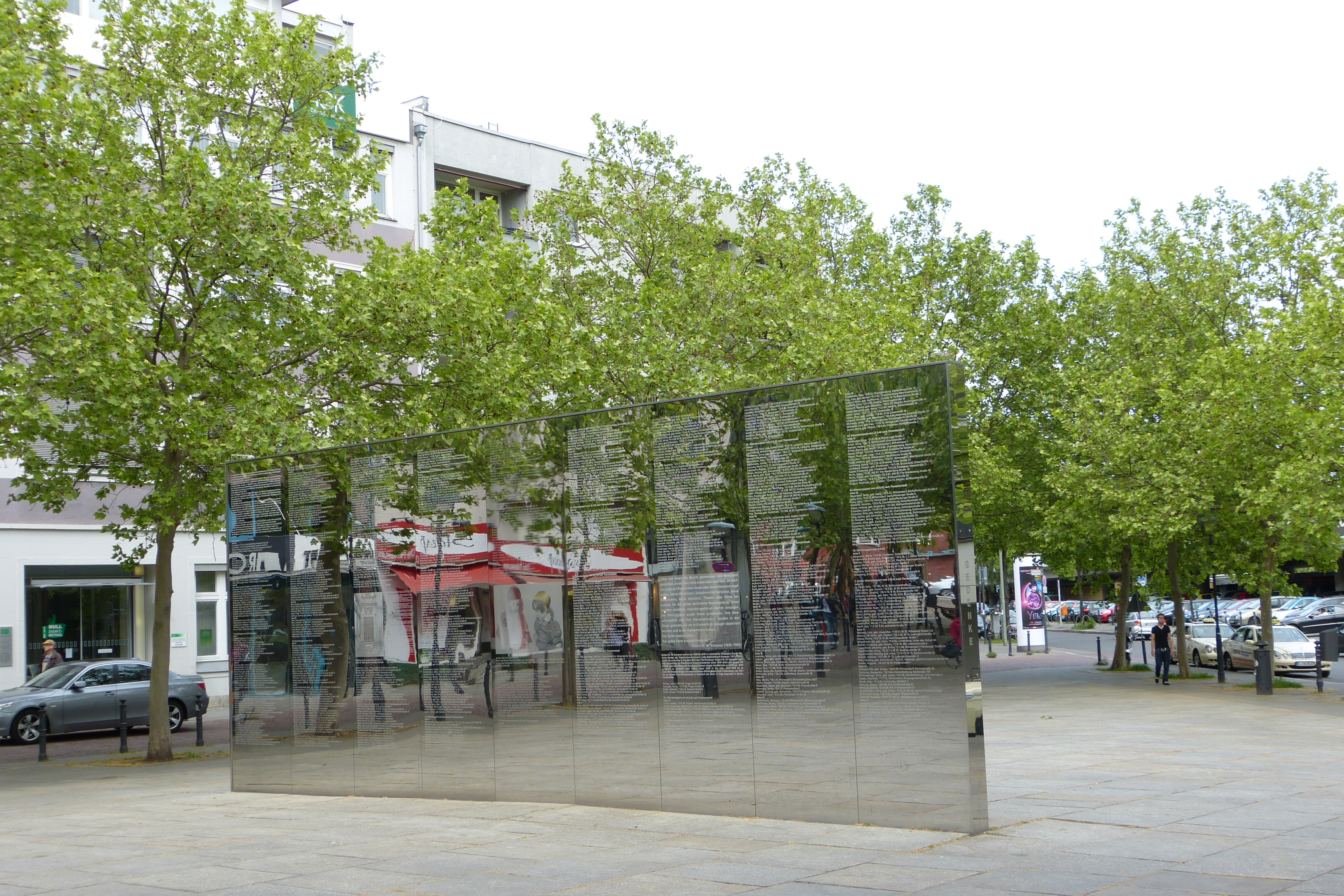 Berlin-Steglitz, Holocaust-Denkmal am Hermann-Ehlers-Platz